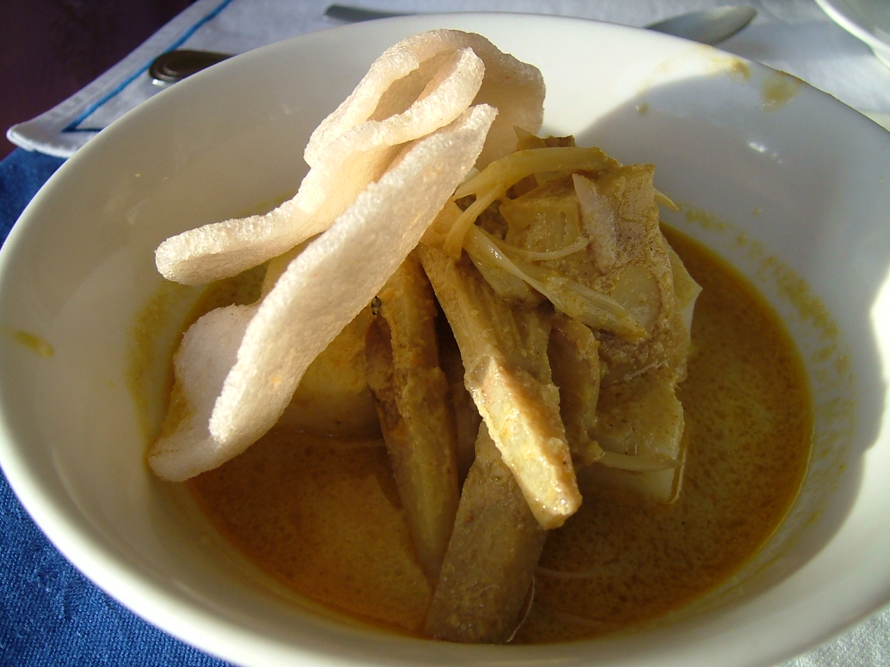 Ketupat Sayur (Ketupat Gulai Nangka/Cubadak)